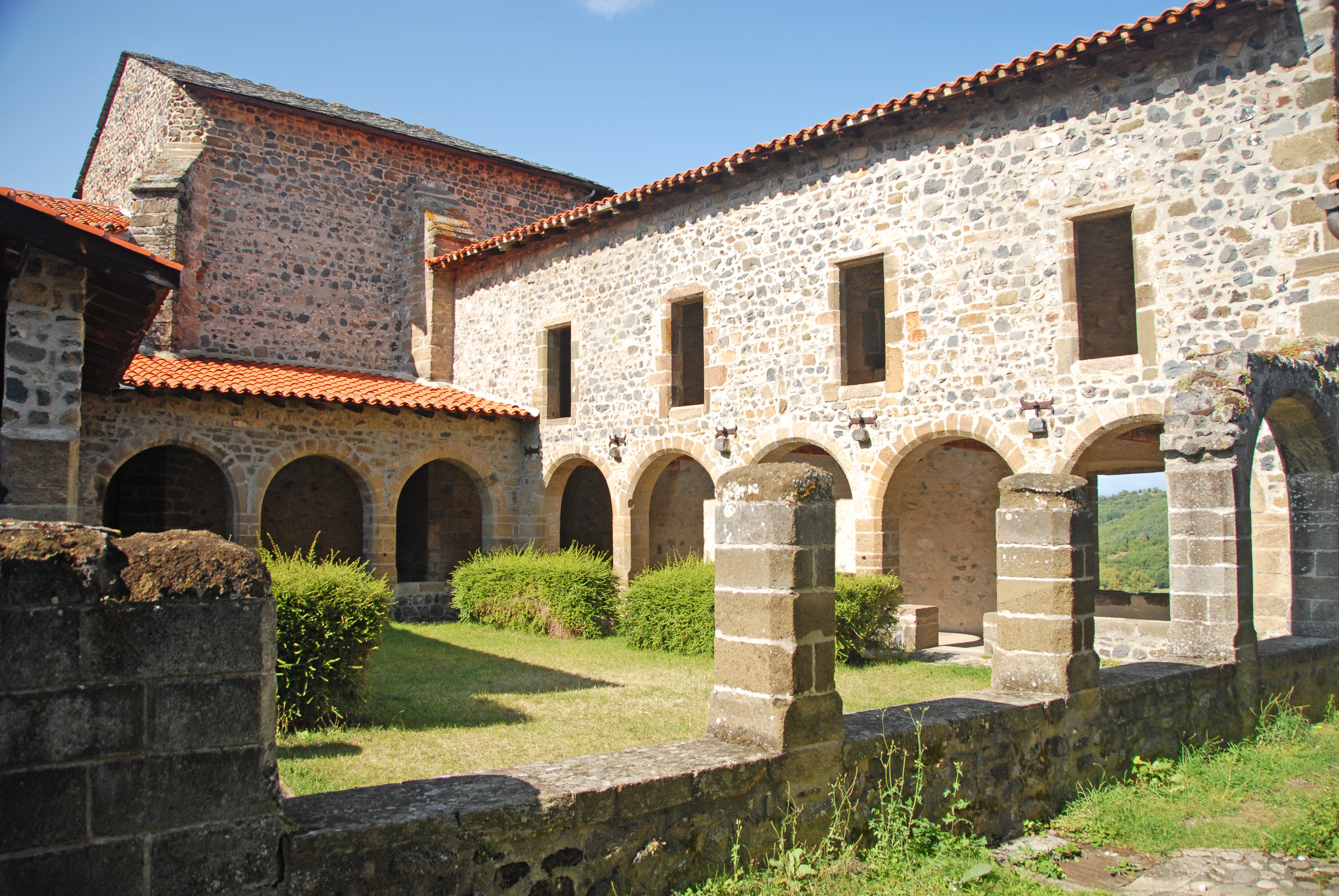 Chanteuges, Kreuzgang v. SW